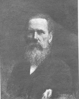 Алексей Иванович Корзухин (1835—1894) — русский жанровый живописец, академик Императорской Академии художеств, участник «бунта четырнадцати», один из учредителей Санкт-Петербургской Артели художников и Товарищества передвижных художественных выставок.